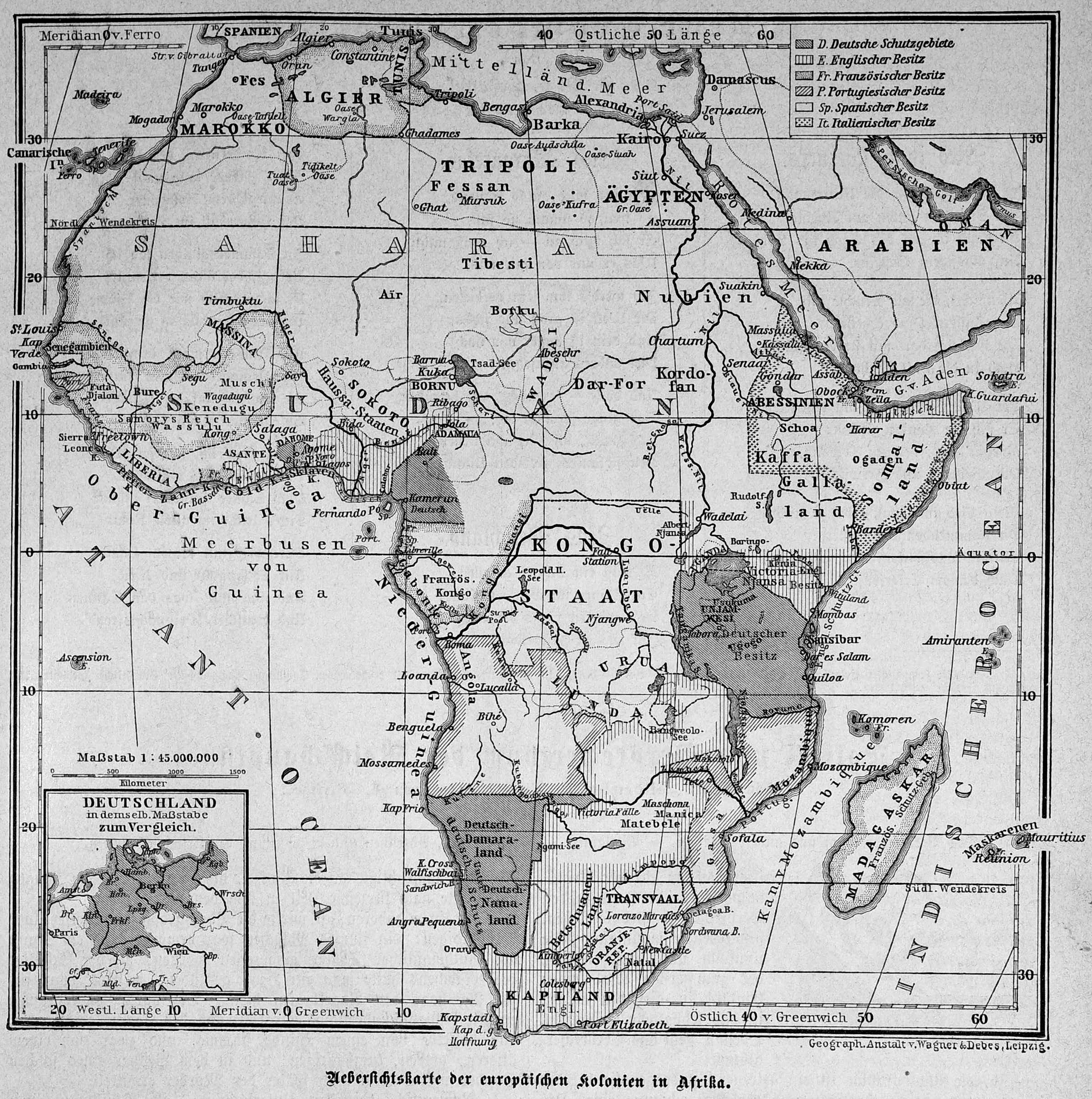 Die Karte ist ein Ausschnitt der S. 703 (Heft 41) des komplett auf Wikisource verfügbaren Werkes "Die Gartenlaube", veröffentlicht 1891. Sie ist dort Teil des Artikels "Die Vertheilung Afrikas unter die europäischen Mächte". Es gab zuvor bereits einen kleineren Ausschnitt dieser Karte, der nur den Bereich des Golfs von Guinea zeigt.